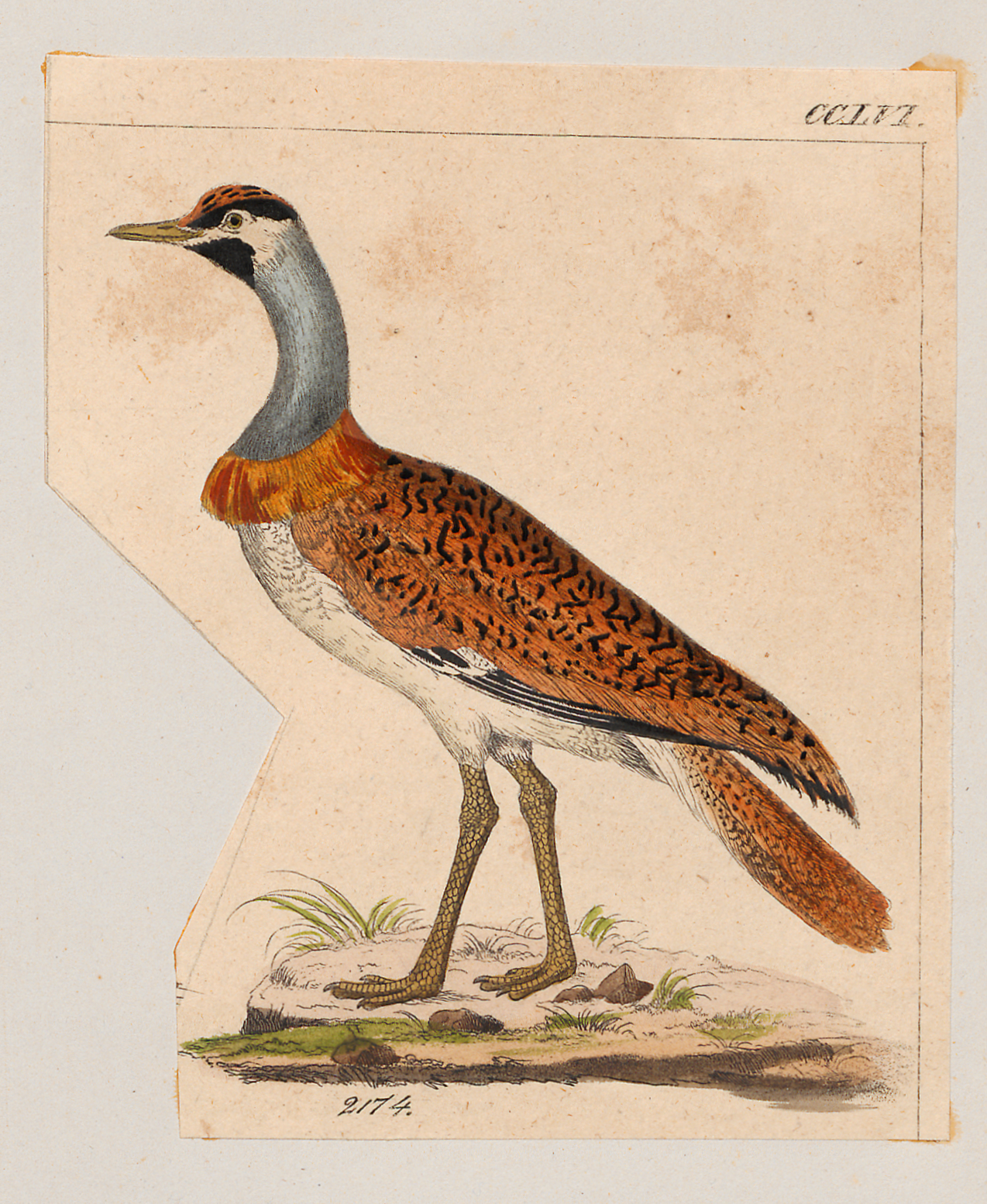 Eupodotis nuba